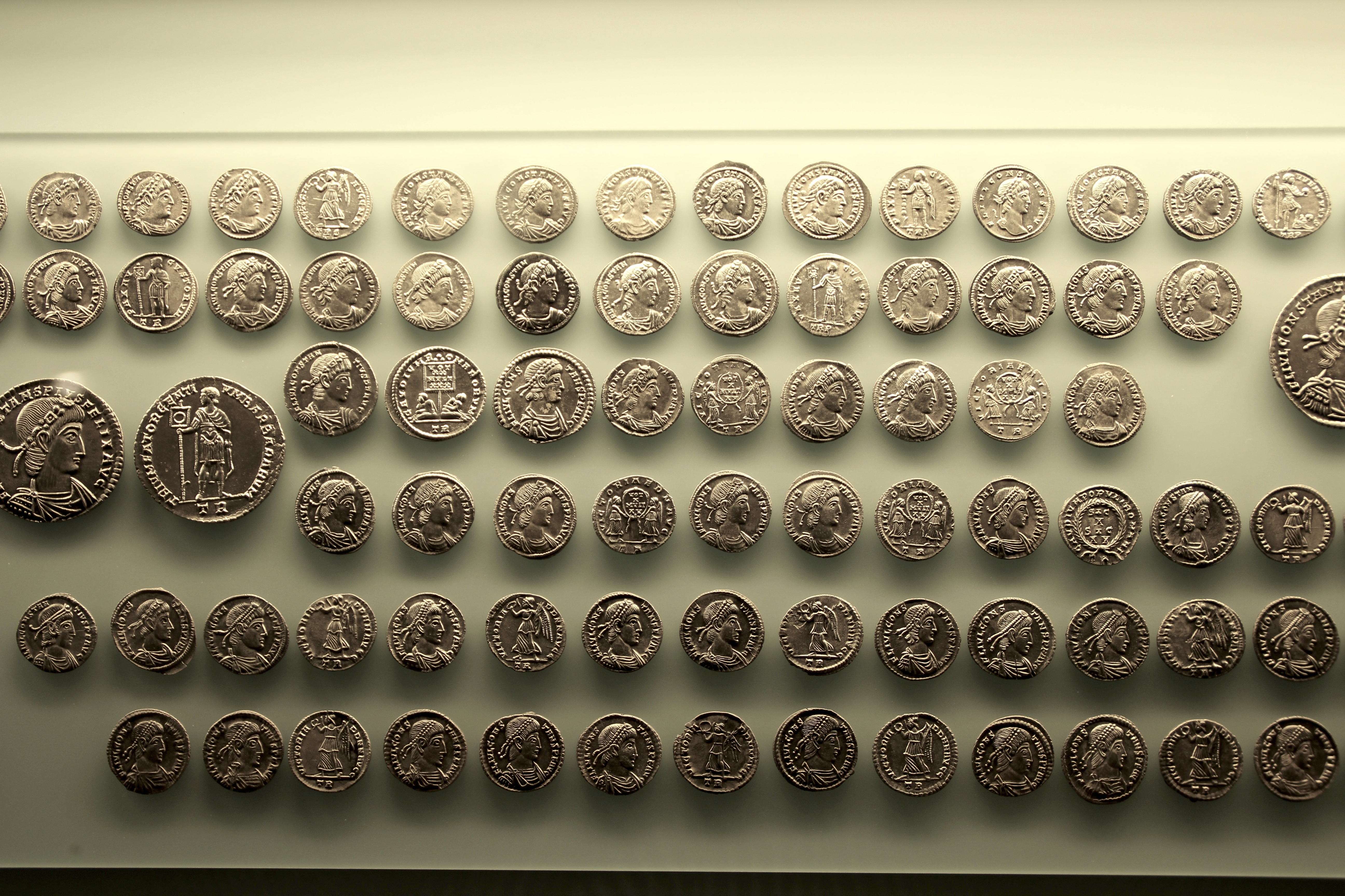 Römische Münzen aus dem Silberschatz von Kaiseraugst